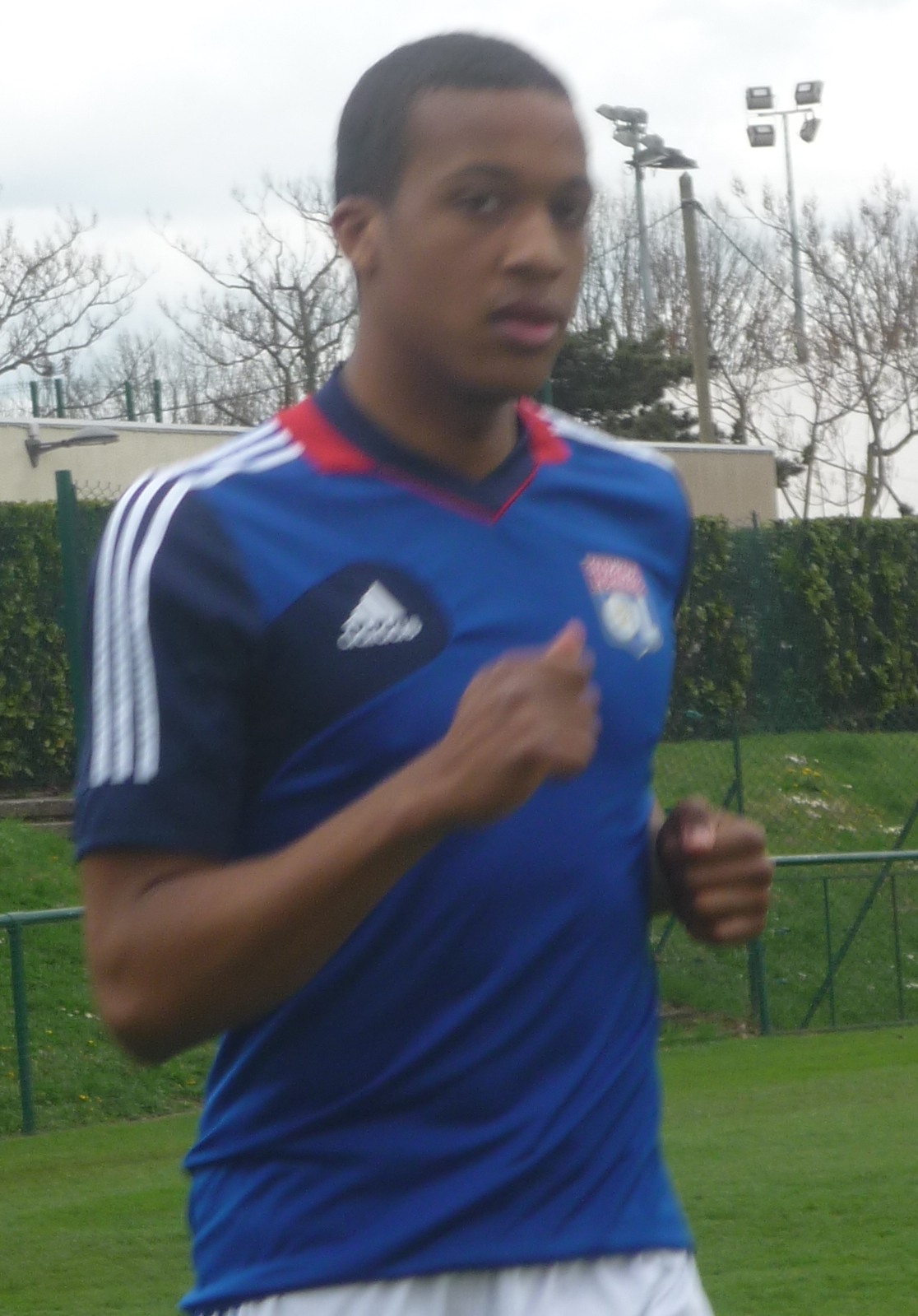 Alassane Pléa, joueur de l'Olympique lyonnais, à l'entrainement en avril 2013